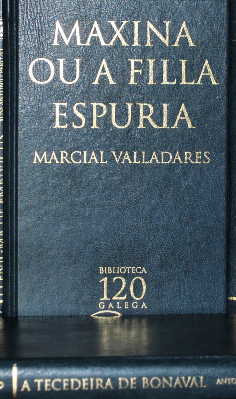 Detalle da capa dun volume e lombo doutro, de dous libros da Biblioteca Galega 120.